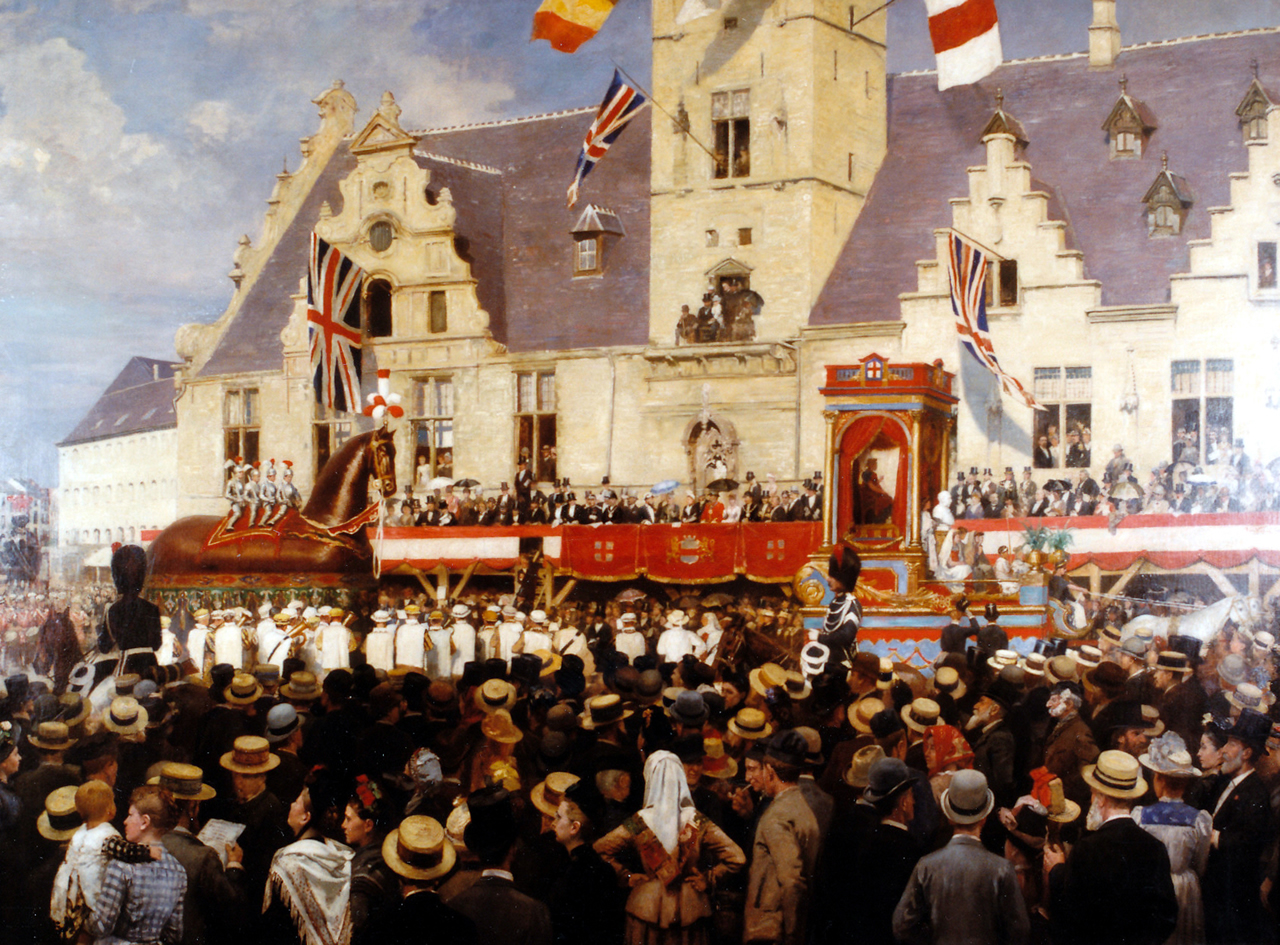 Dendermonde - Belgium Beschrijving: Dit schilderij werd gerealiseerd als herinnering aan de eer die Dendermonde aan Sir Polydore De Keyser bewees, door op 26 en 27 augustus 1888 een Ros Beiaardommegang te organiseren ter gelegenheid van het bezoek van de Lord Mayor (1887-88) van Londen aan zijn geboortestad. Het schilderij toont ons de aankomst op de Grote Markt van de praalwagen 'Stad London' (met de buste van P. De Keyser) en van het Ros Beiaard, bereden door de Vier Heemskinderen (gebroeders Pieters). Op de voorgrond kijkt een grote menigte nauwlettend toe. Tegen de voorgevel van het met Engelse vlaggen gelooide stadhuis staat een grote eretribune, met centraal de Lord Mayor en zijn gevolg. Onder het tweede raam van rechts bemerken we de karakteristieke 'kop' van Emanuel Hiel, met achter hem zijn vriend Peter Benoit (met bolhoed). rechts vooraan situeert de schilder zichzelf en zijn dochter. Volgens een beproefd recept, heeft Jan Verhas tussen de toeschouwers nog enkele andere figuren herkenbaar geportretteerd. Signatuur rechts midden : Jan Verhas 1891.